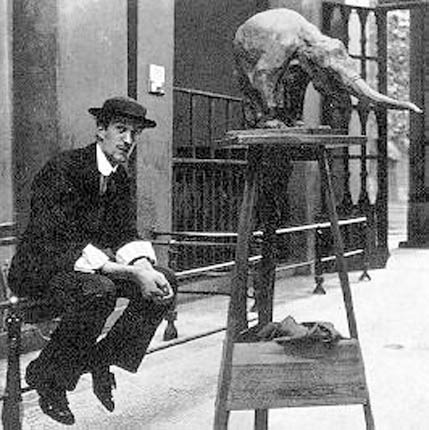 Rembrandt bugatti zoo antwerpen 1910